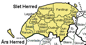 Slet Herred, Aalborg Amt, Denmark Source: Map by Svend-Erik Christiansen